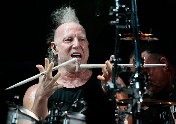 Mike Terrana en la gira con Tarja Turunen en 2012